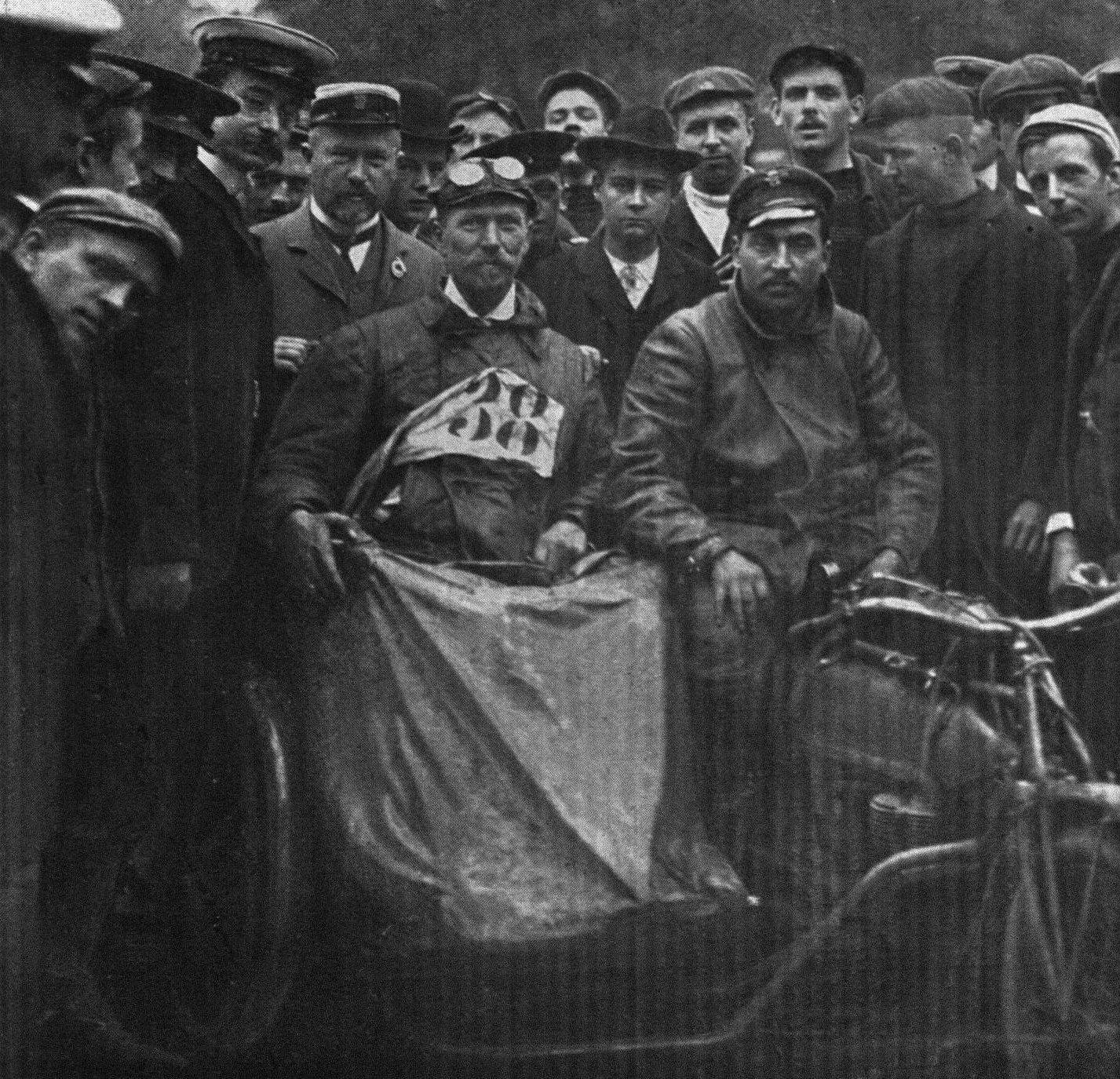 Johannes Pundt, der als Motorradfahrer an Rund um Berlin 1905 teilgenommen hatte, erreichte das Ziel nach einem Unfall in einem Motorradbewagen.